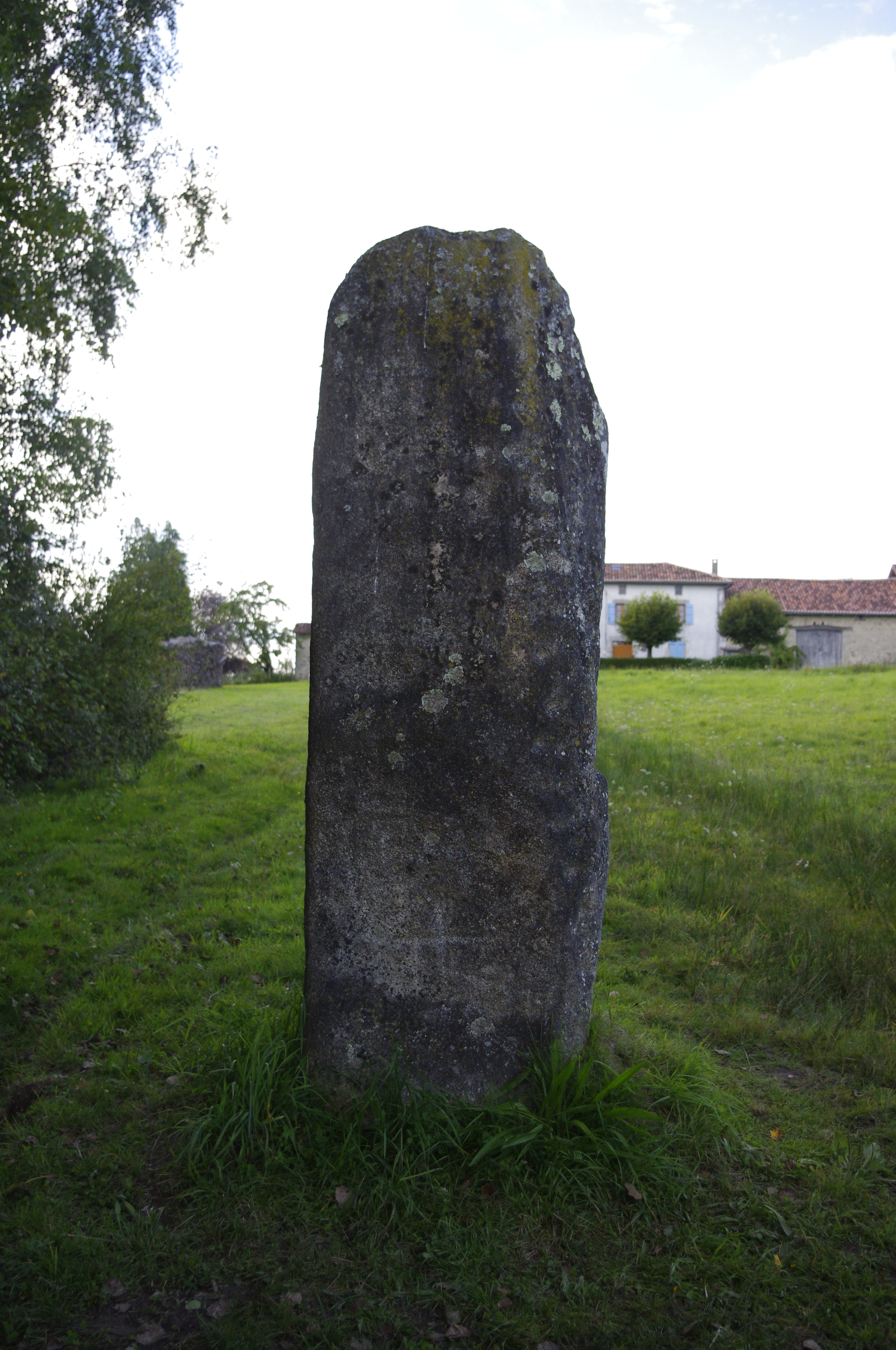 Menhir d'Arnac, à Arnac, commune de Cieux, Haute-Vienne, France